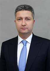 Заместитель Министра обороны Российской Федерации Тимур Вадимович Иванов